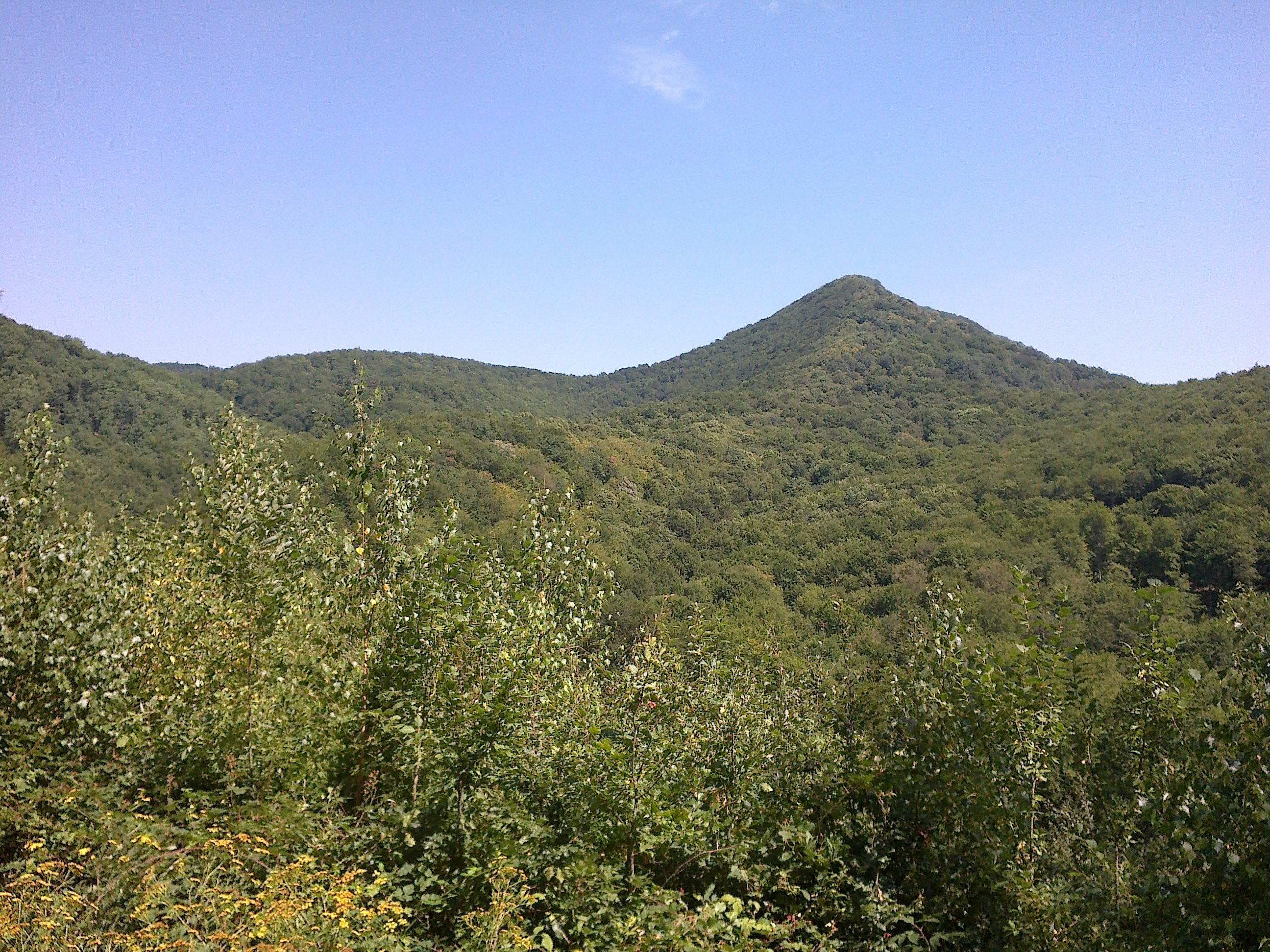 Vrh Papuk